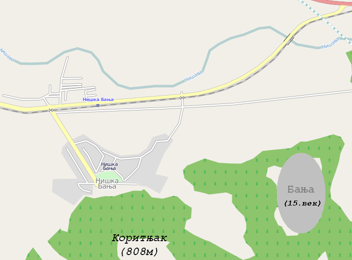 Selo Banja (prvobitna lokacija iz 15.veka) i Niška Banja (današnja lokacija).